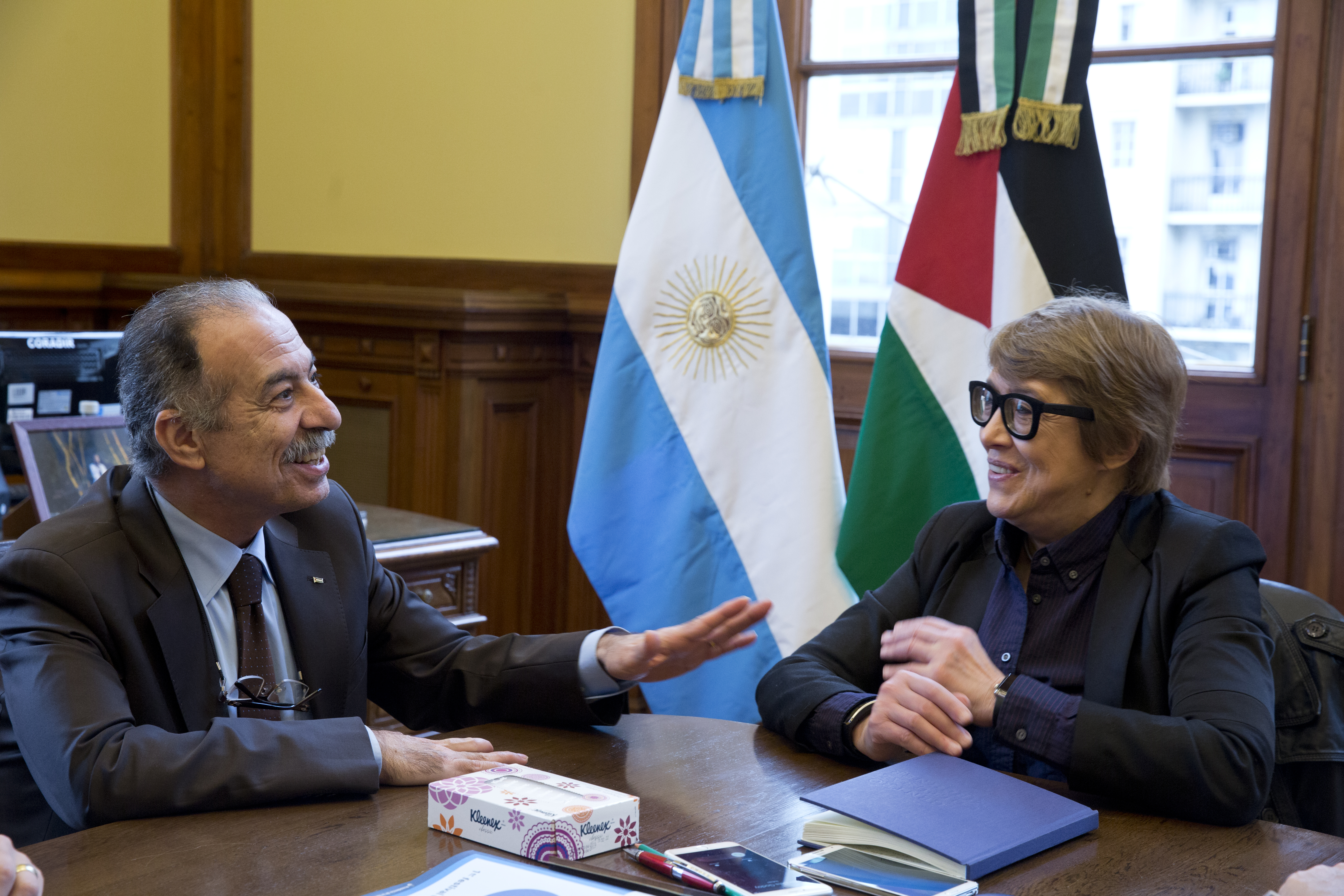 Buenos Aires, 07 de agosto de 2015 La ministra de Cultura de la Nación, Teresa Parodi, se reunió esta mañana en su despacho del Centro Cultural Kirchner, con el embajador de Palestina en la Argentina, Husni Abdel Wahed. Acompañó a Parodi la directora de Política Cultural y Cooperación Internacional, Mónica Guariglio. Fotos: Silvina Frydlewsky / Ministerio de Cultura de la Nación